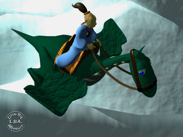 Capture d'écran du jeu vidéo Little Big Adventure (1994), développé par Adeline Software International.